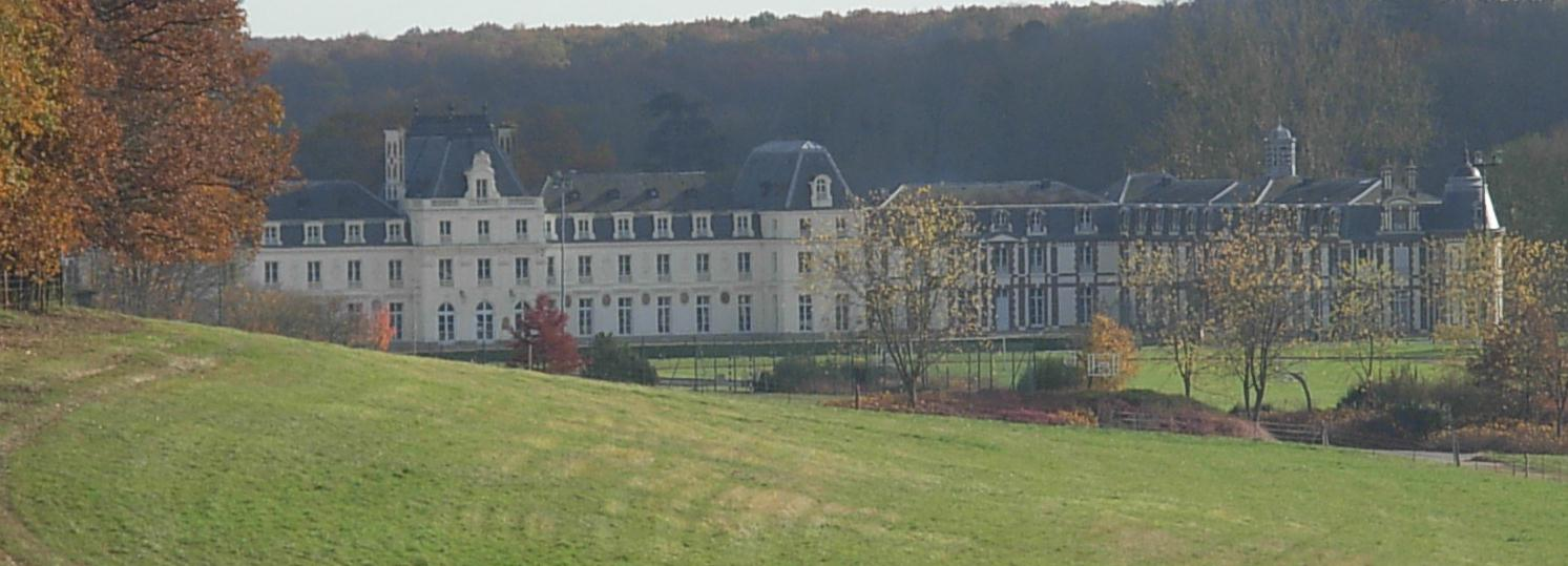 Vue de la cour d'honneur